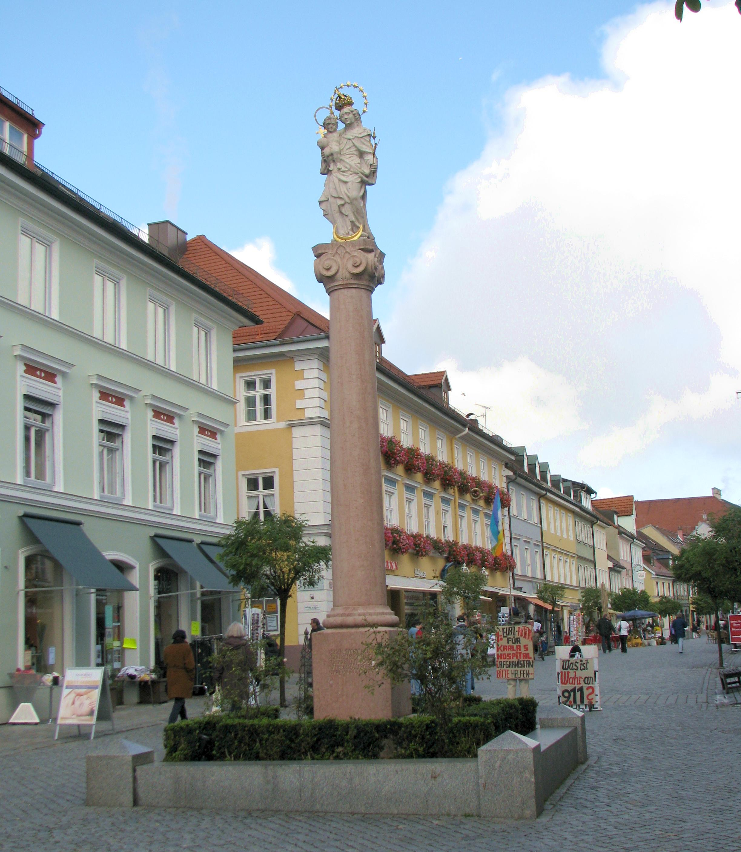 Mariensäule auf dem Markt zu Murnau.